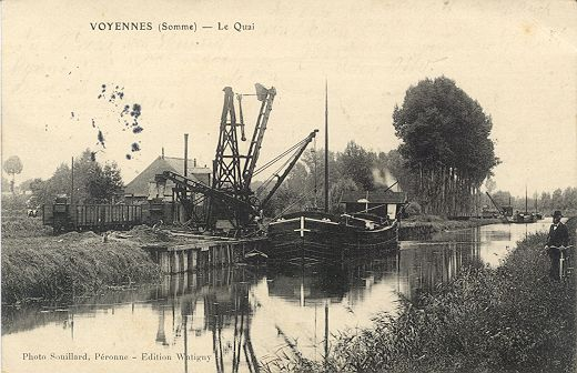 Vue d'une partie du port de marchandises de Voyennes, avec sur le quai, un embranchement du tortillard qui permettait le transport via l'eau ou via la voie ferrée.